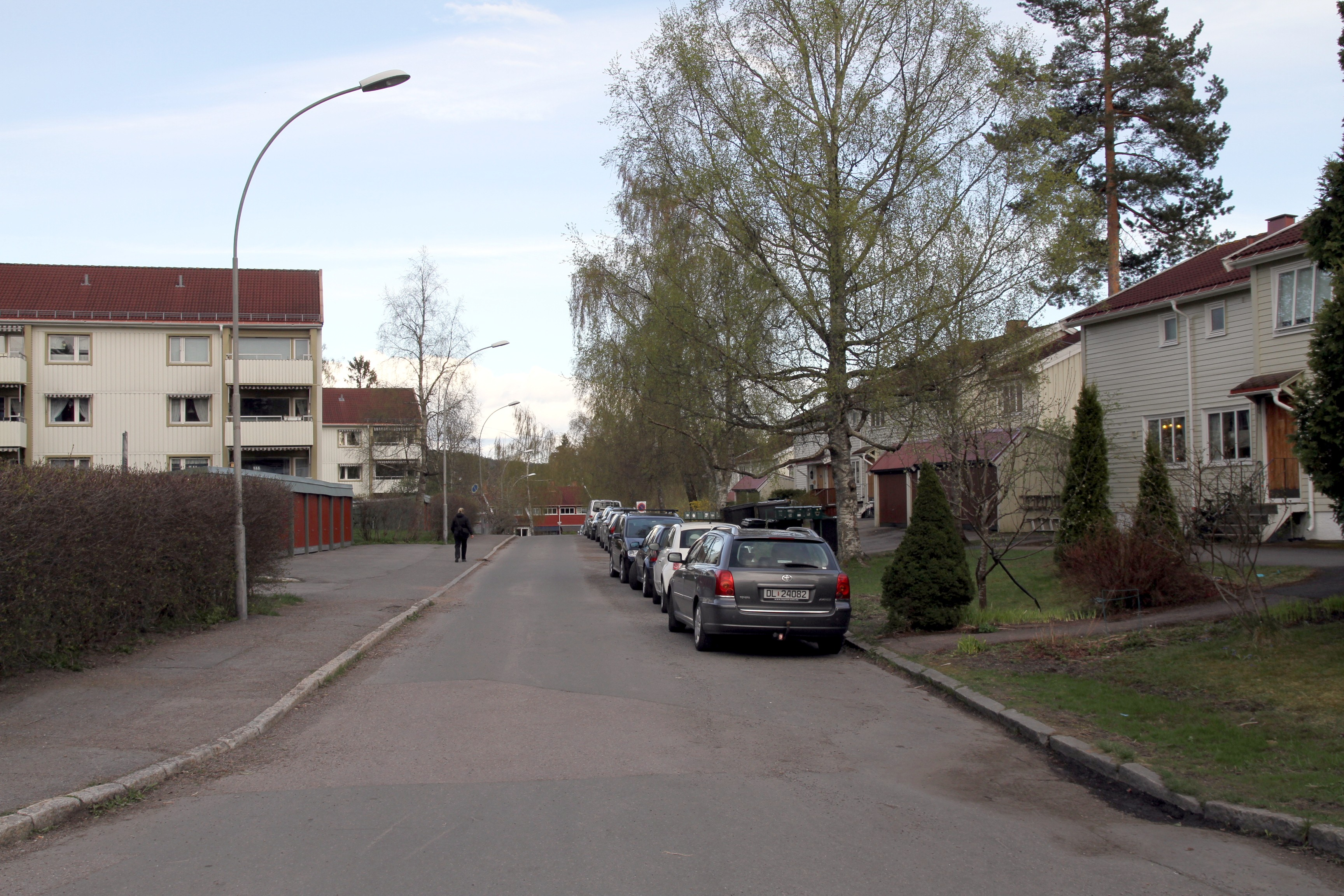 Nøkleveien på Bøler i Oslo.